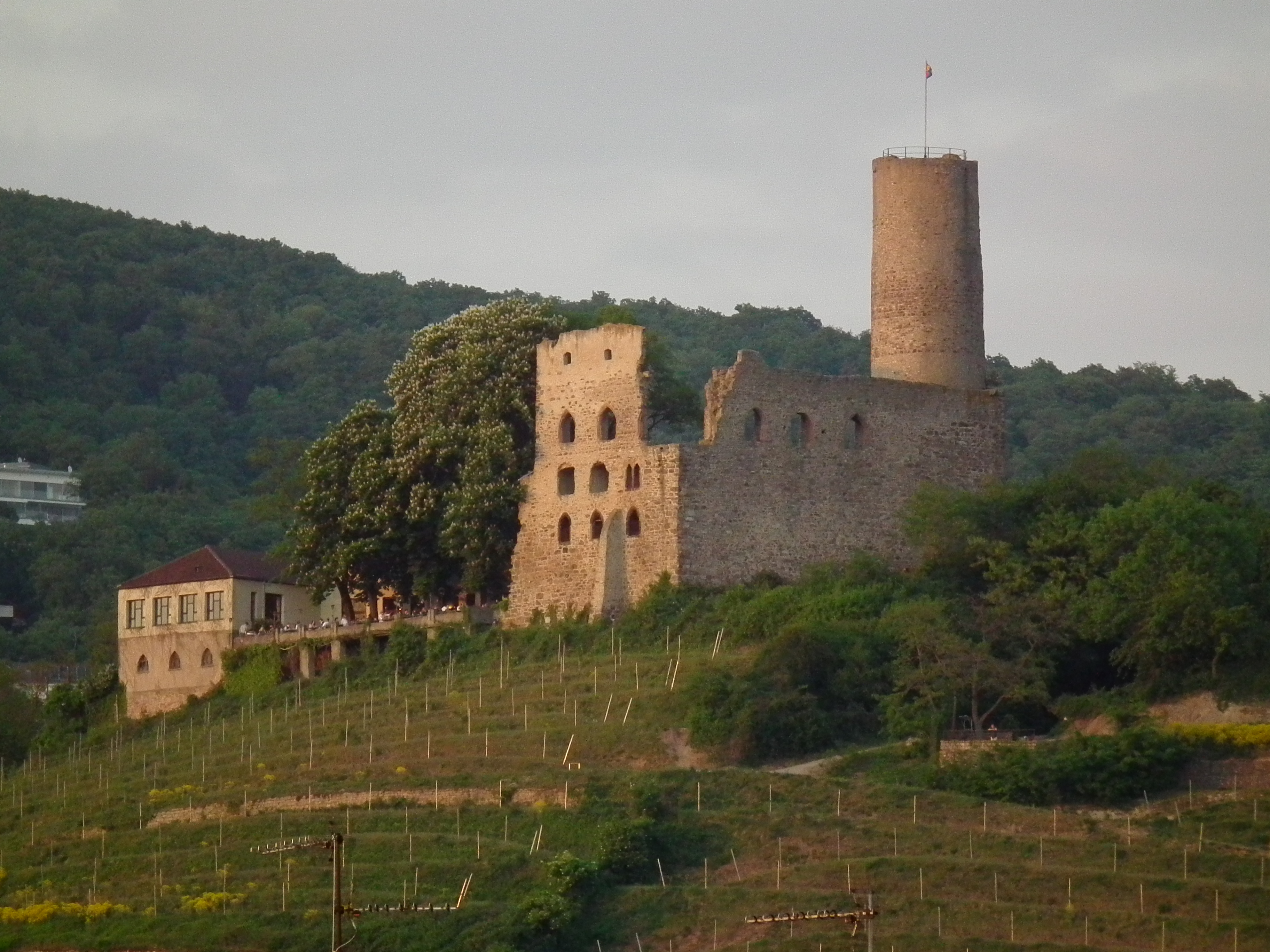 Strahlenburg in Schriesheim, umgeben von Weinbergen (Baden-Württemberg, Deutschland)